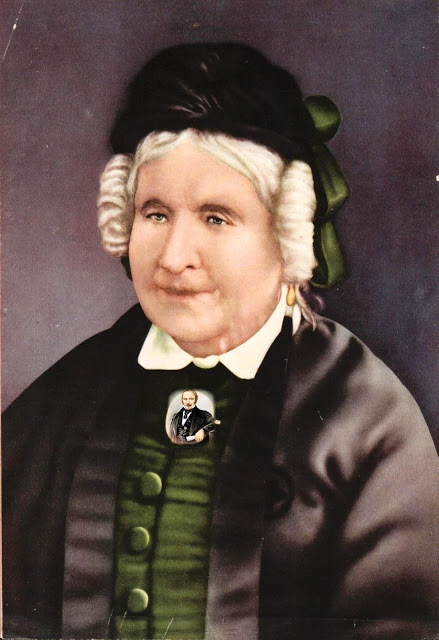 Portrait d'Amélie Gabrielle Boudet, Mrs. Allan Kardek, réalisé vers 1860. Domaine public.